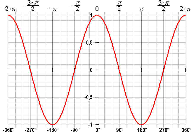 Graf over cosinus som en funktion af vinkler fra -360 til 360 grader. Desuden forsynet med en sekundær skala langs x-aksen, som angiver vinklerne i radianer